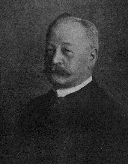 Пилар-фон-Пильхау Адольф Адольфович